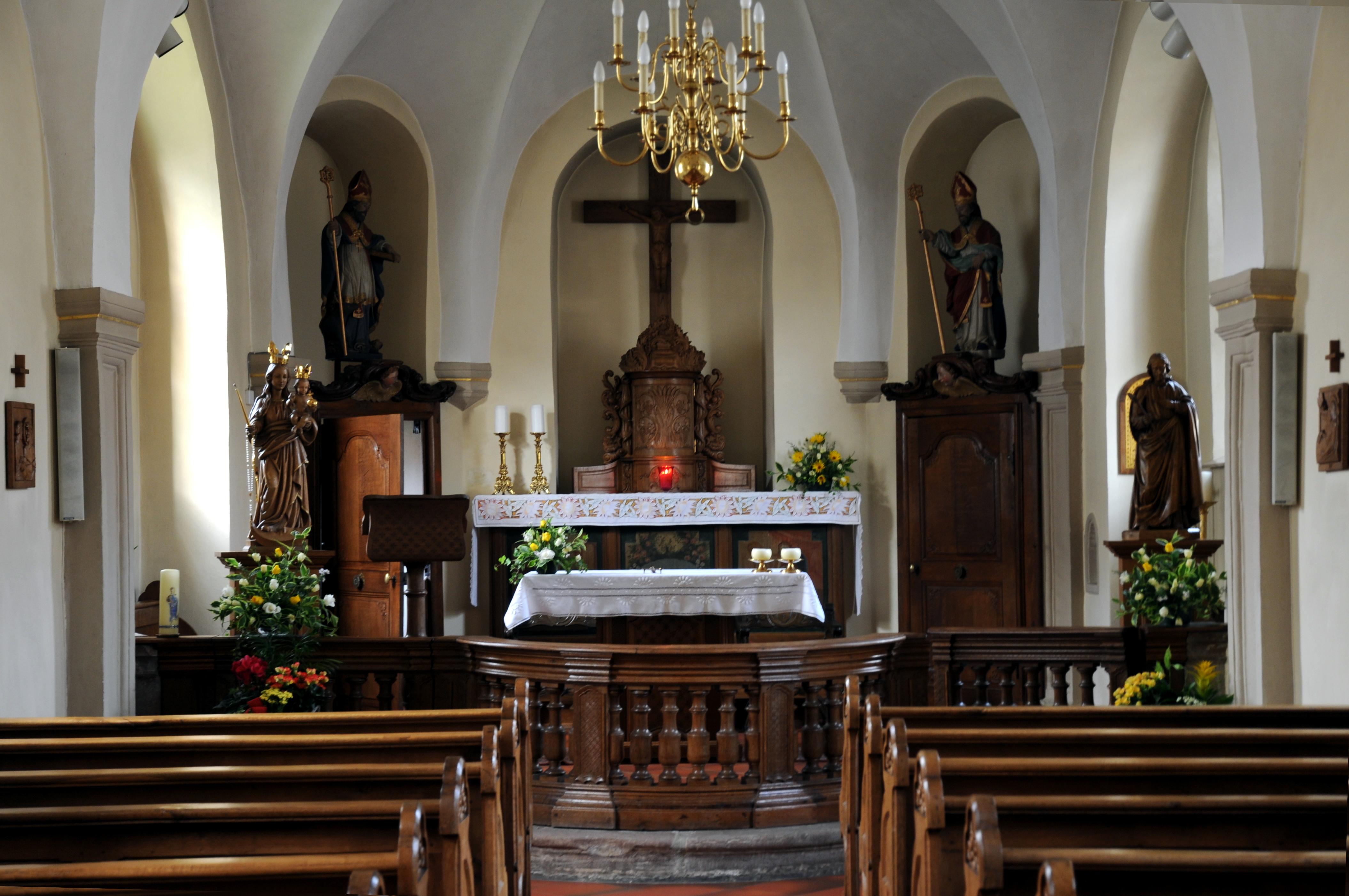 En Deel vum Interieur an der Kierch zu Bierden.